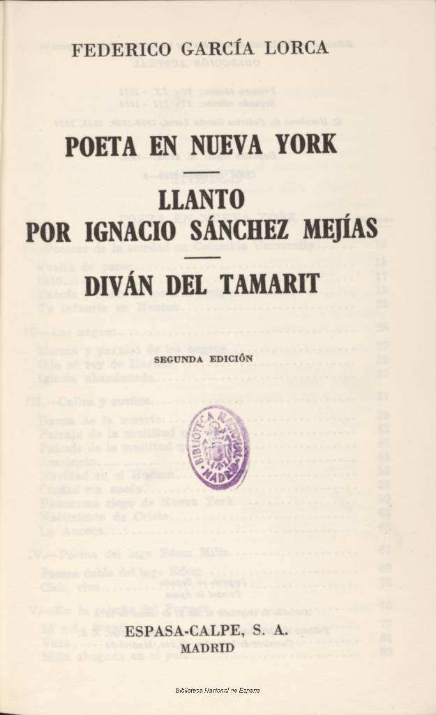 Poeta en Nueva York ; Llanto por Ignacio Sánchez Mejías ; Diván del Tamarit Autor: García Lorca, Federico (1898-1936) Fecha: 1975 Datos de edición: Madrid Espasa Calpe